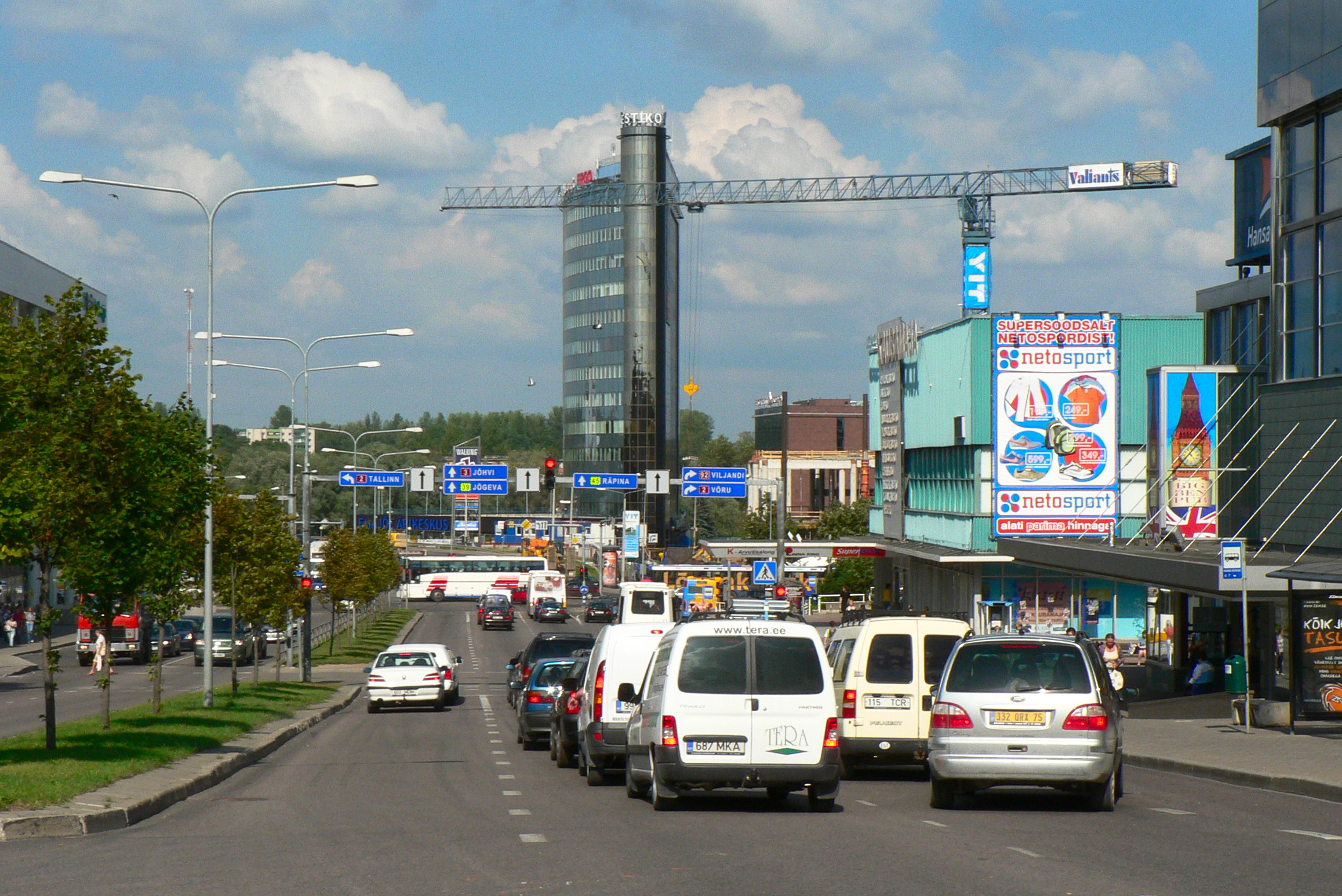 Riia tänava algus Tartus.